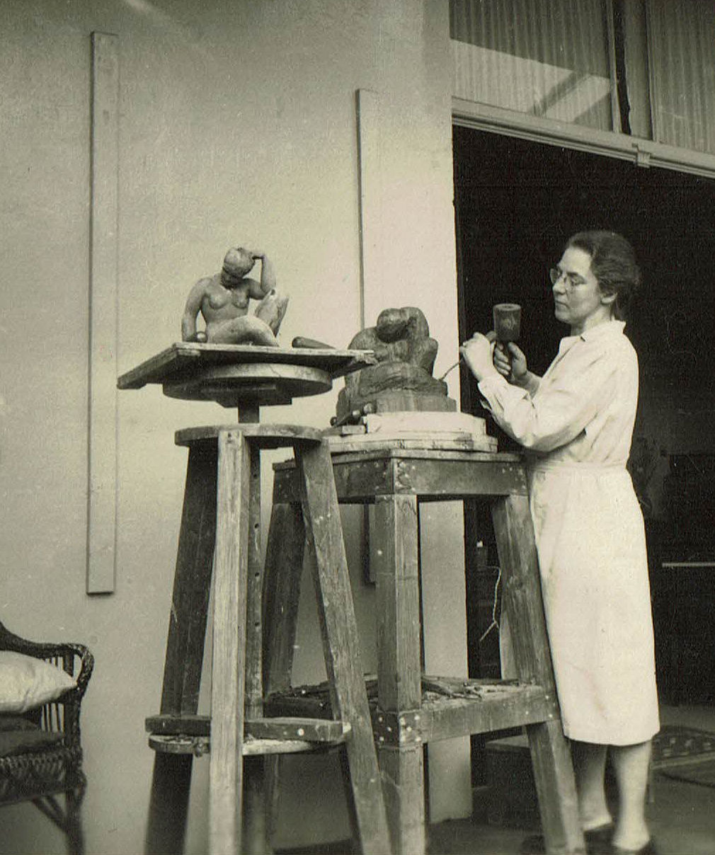 Anna Petronella van der Heide - Hemsing in haar Atelier